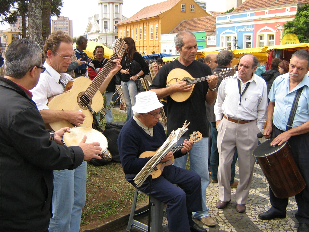 Curitiba - Feira do Largo da Ordem - Grupo musical de chorinho